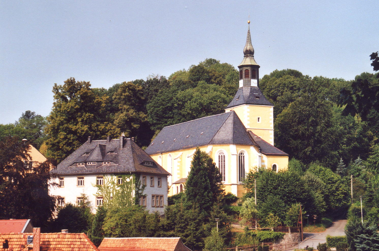 Liebstadt: Blick von Schloss Kuckuckstein auf die Kirche